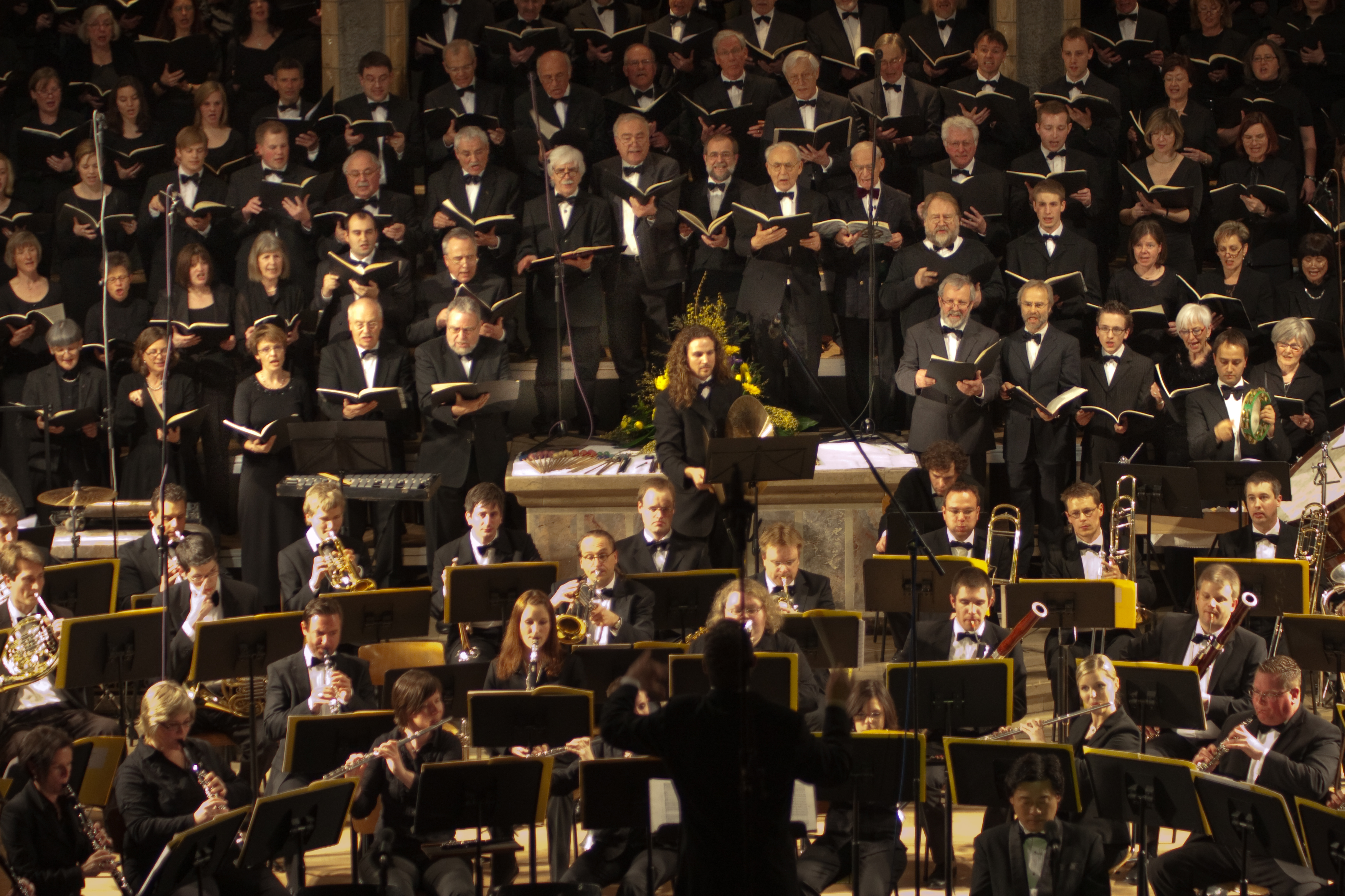 Pauluskirche in Ulm, Germany